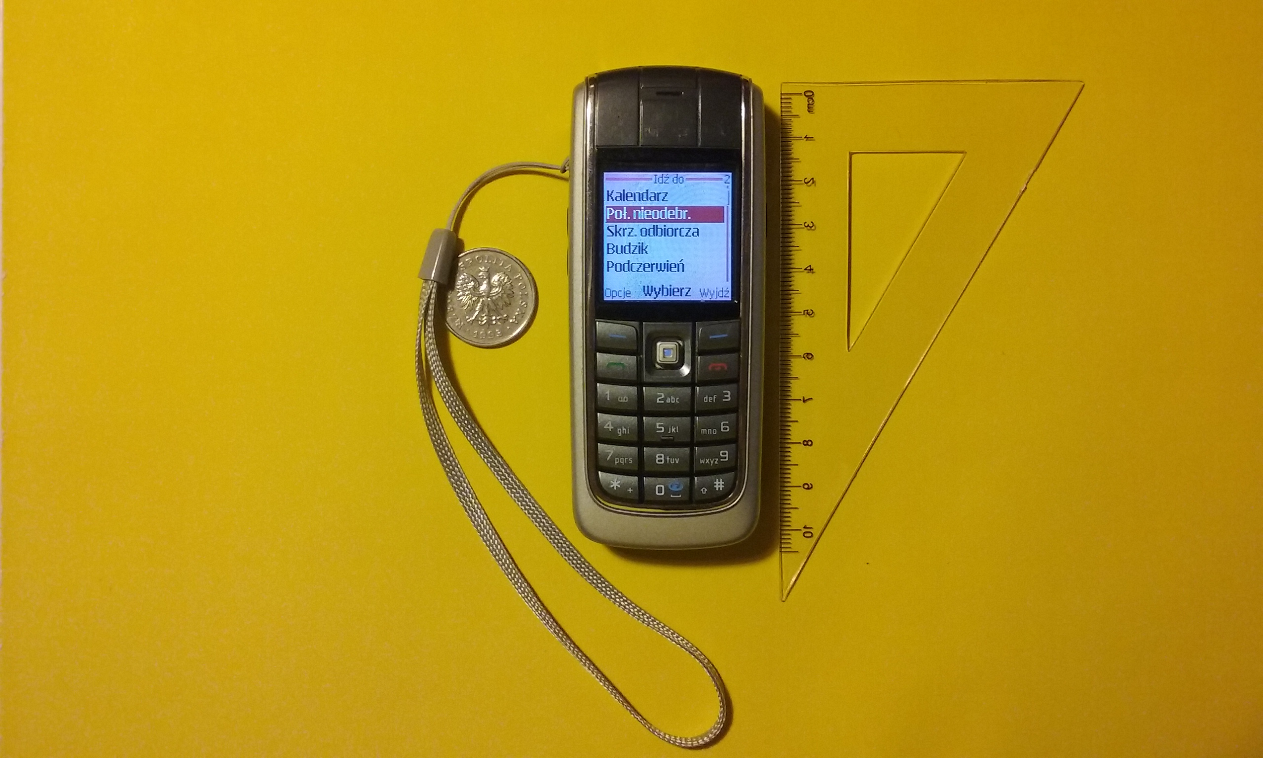 Nokia 6020 z menu w języku polskim, w skali porównawczej. Grudzień 2018 roku